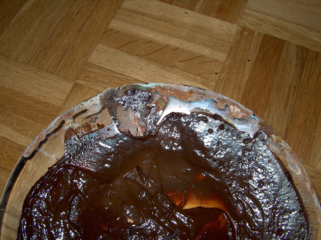 Kupferazid, braune Modifikation